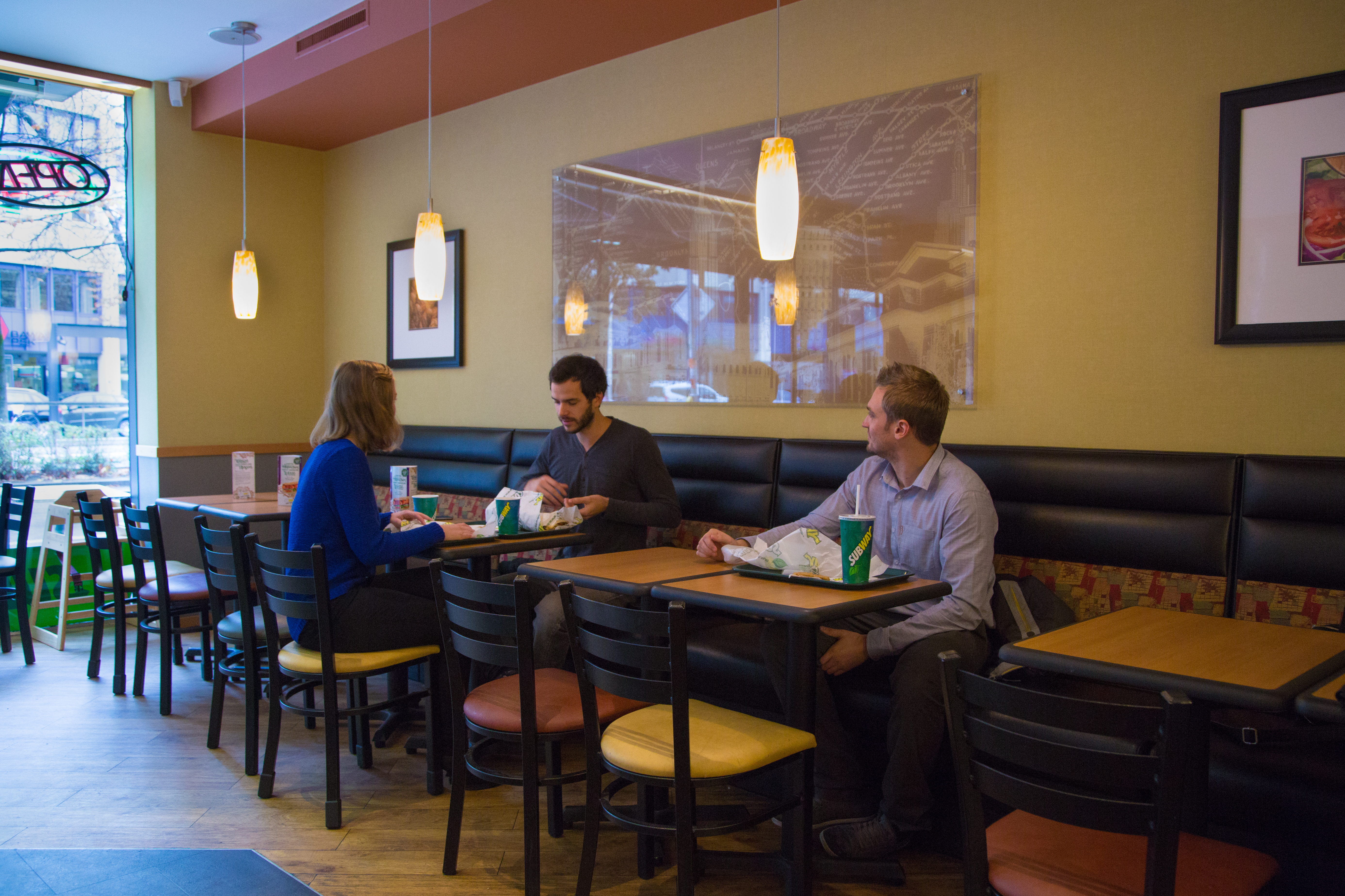 Subway-Restaurants werden im Metropolitan Décor eingerichtet.